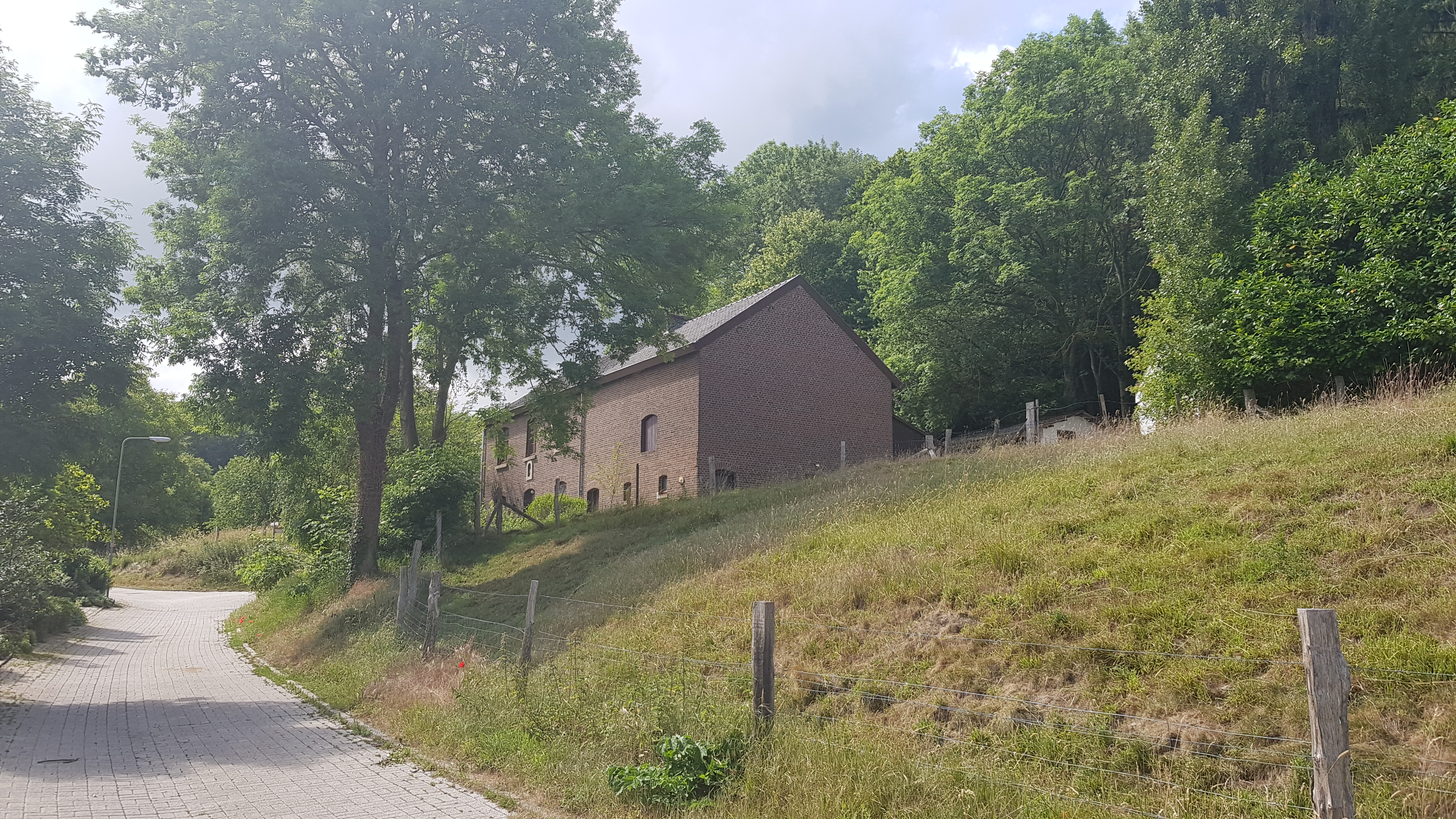 Mariabeeldje in gevel Dal Bissenweg 12, Bissen, Nederland